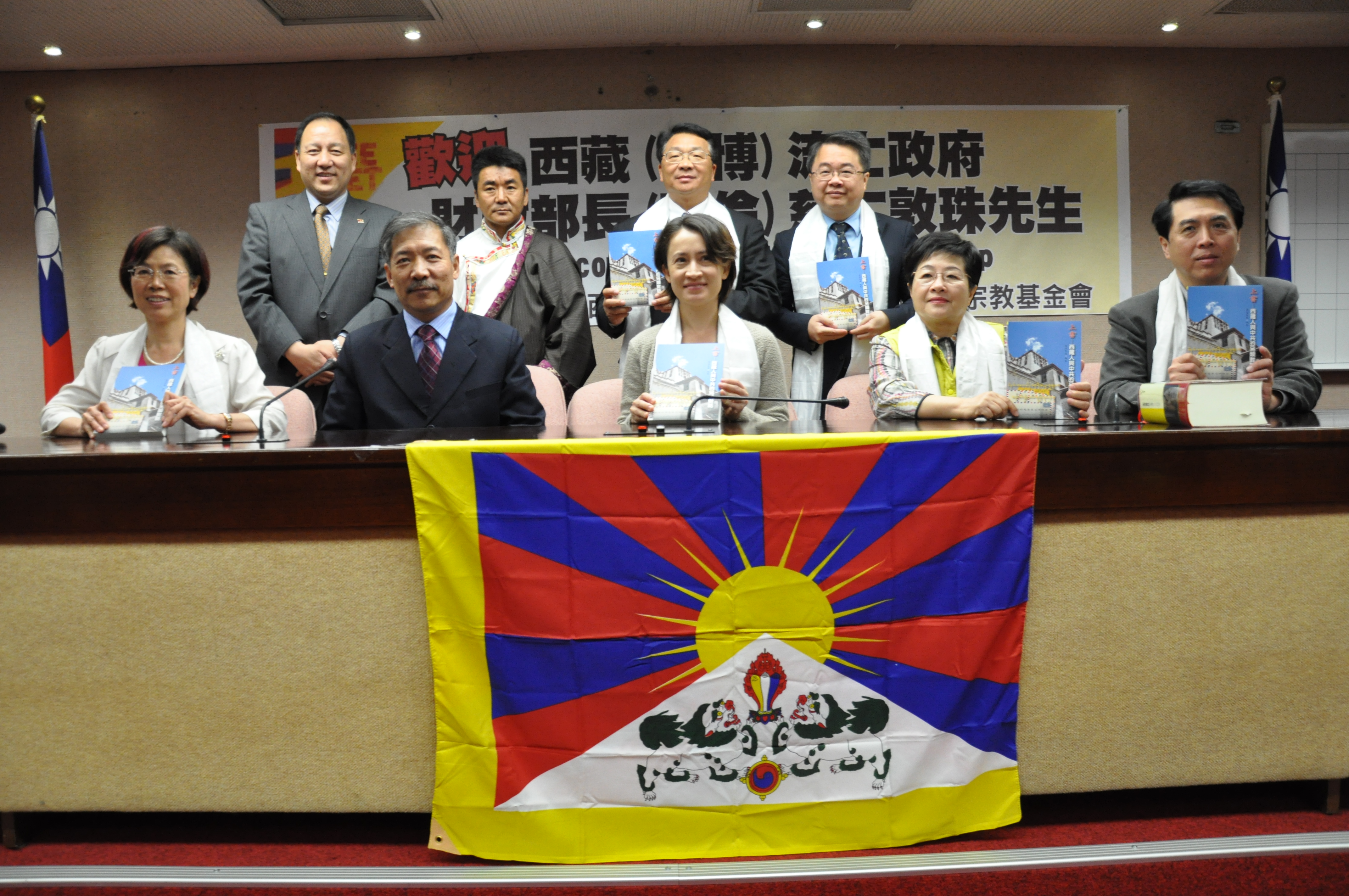 中華民國立法院圖博(西藏)國會小組與達賴喇嘛西藏宗教基金會接待西藏流亡政府(藏人行政中央)財政部長慈仁敦珠(Tsering Dhondup)。慈仁敦珠與立法委員尤美女、蕭美琴、陳節如、吳秉叡、陳歐珀、陳學聖合影。